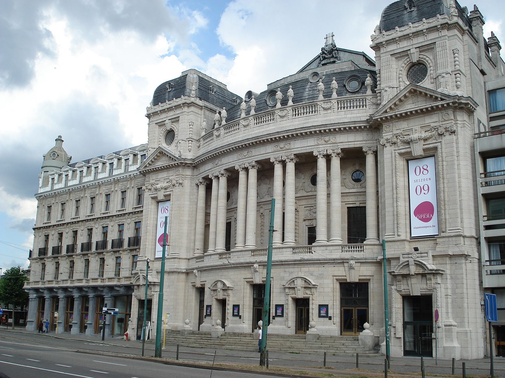 Operagebouw, Frankrijklei, Antwerpen. Bouwjaar 1907, n.o.v. arch. Van Mechelen. Vgl. Inventaris van het Onroerend Erfgoed.